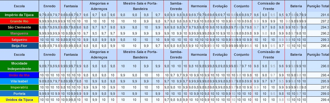 Resultados do Carnaval do Rio - 2014